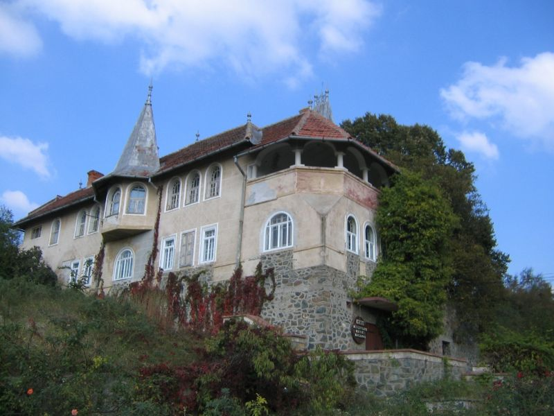 Museo della vite e del vino, Ghioroc, Romania. File proveniente da ro.wiki